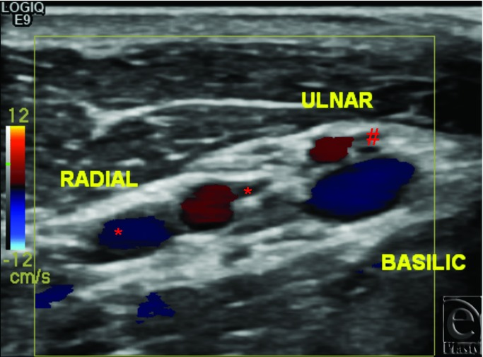 Präoperative Sonographie. Zu sehen ist die Bifurkation der Arteria brachialis in die Arteria radialis und die Arteria ulnaris, außerdem zwei radiale Venen (gekennzeichnet mit *) und eine ulnare Vene (gekennzeichnet mit #)